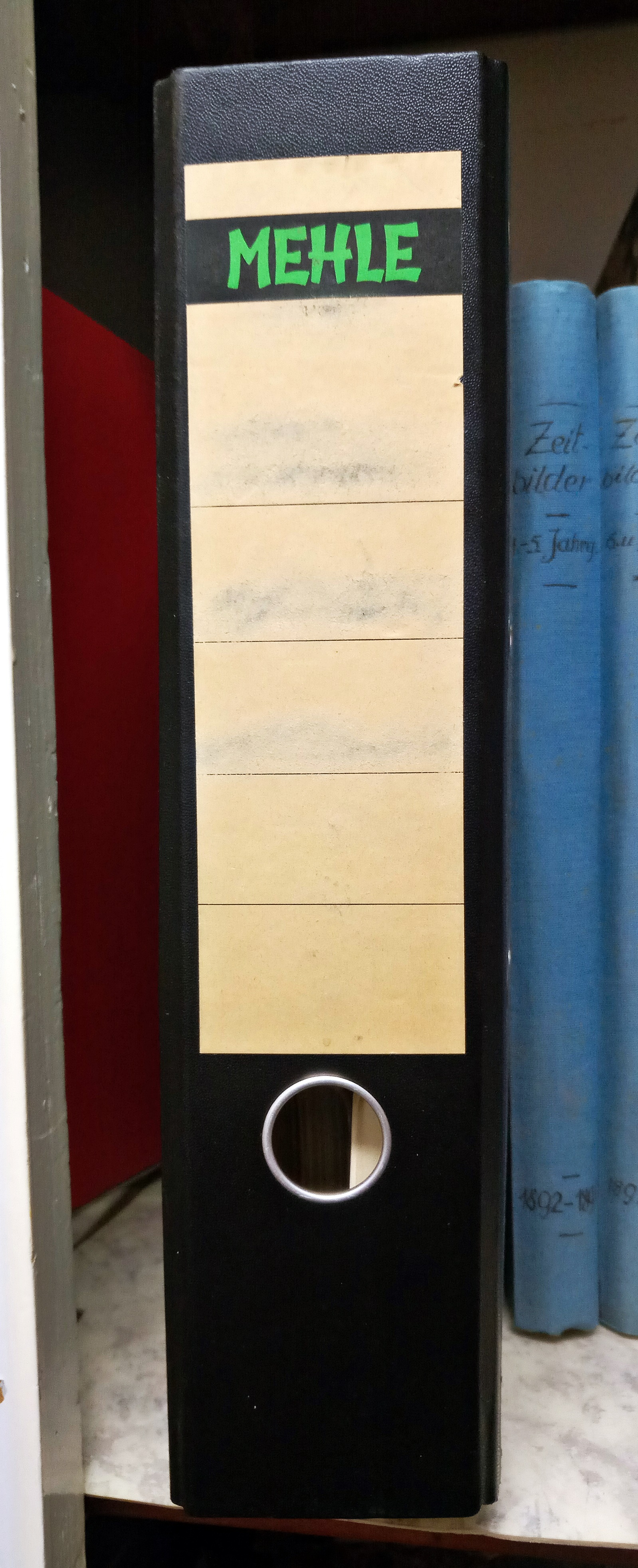 Alter Mehle-Aktenordner, Göttingen (Gründer Emil Mehle 1868-1960 von Grünstadt). Eigenes Bild von eigenem altem Ordner.